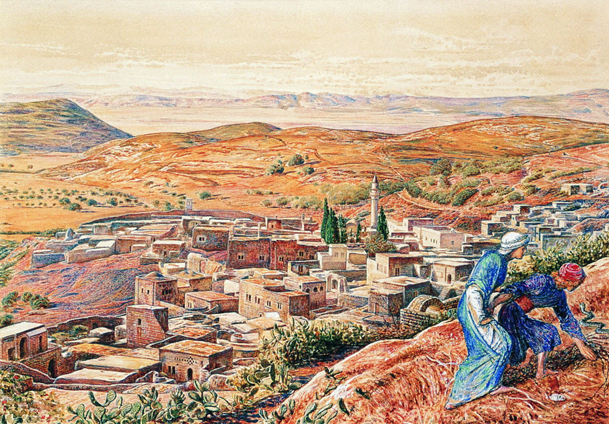 Nazareth